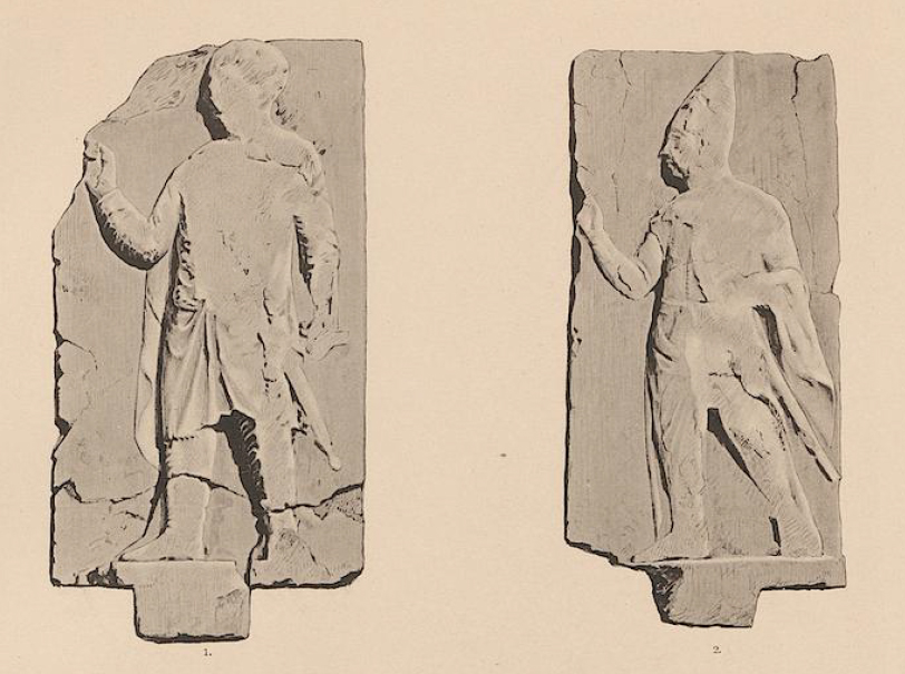 Reliefs von Verwandten des Königs Antiochos I. vom Nemrut Dağı, Türkei. Wahrscheinlich Söhne des Königs, rechts Mithridates II.